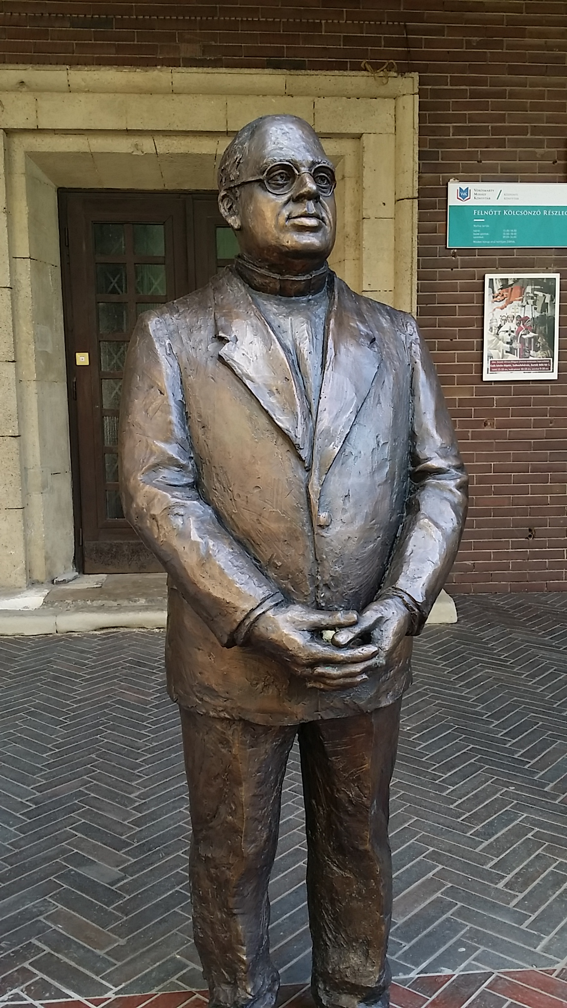 Kornis Gyula szobra